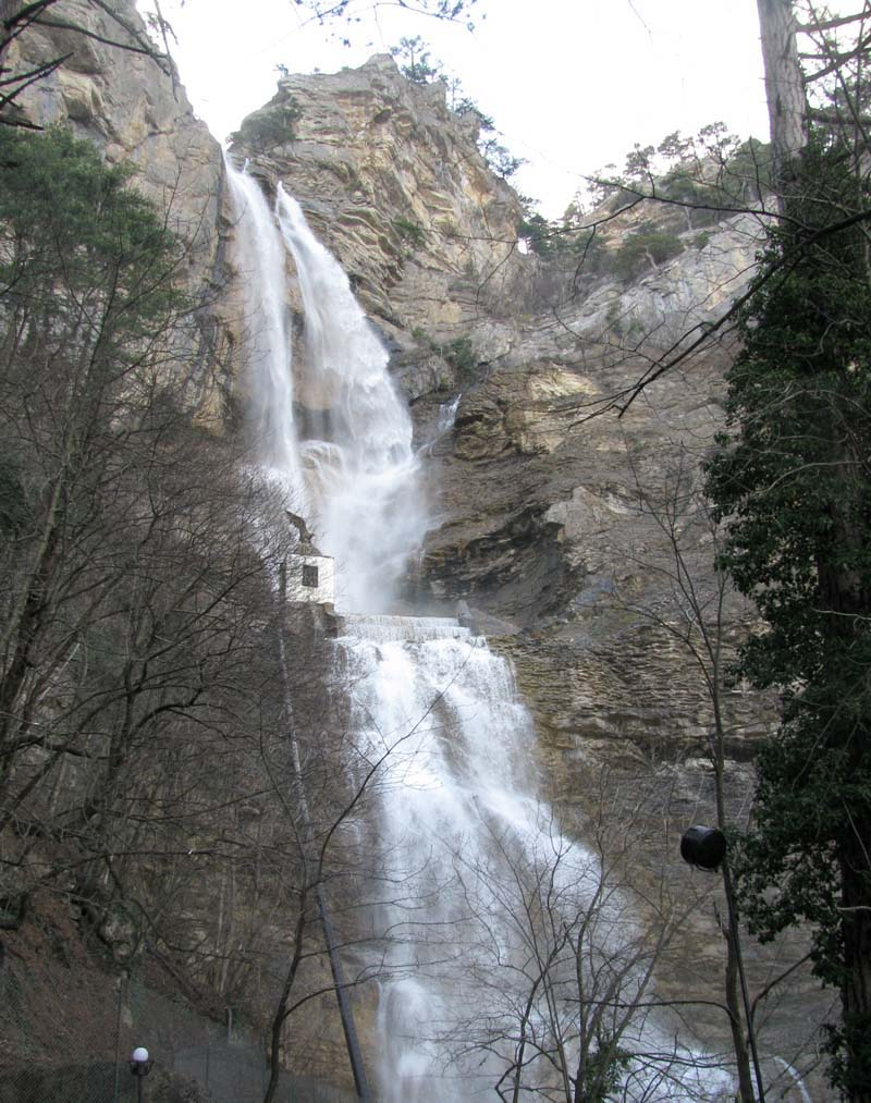 Водопад Учан-Су возле Ялты